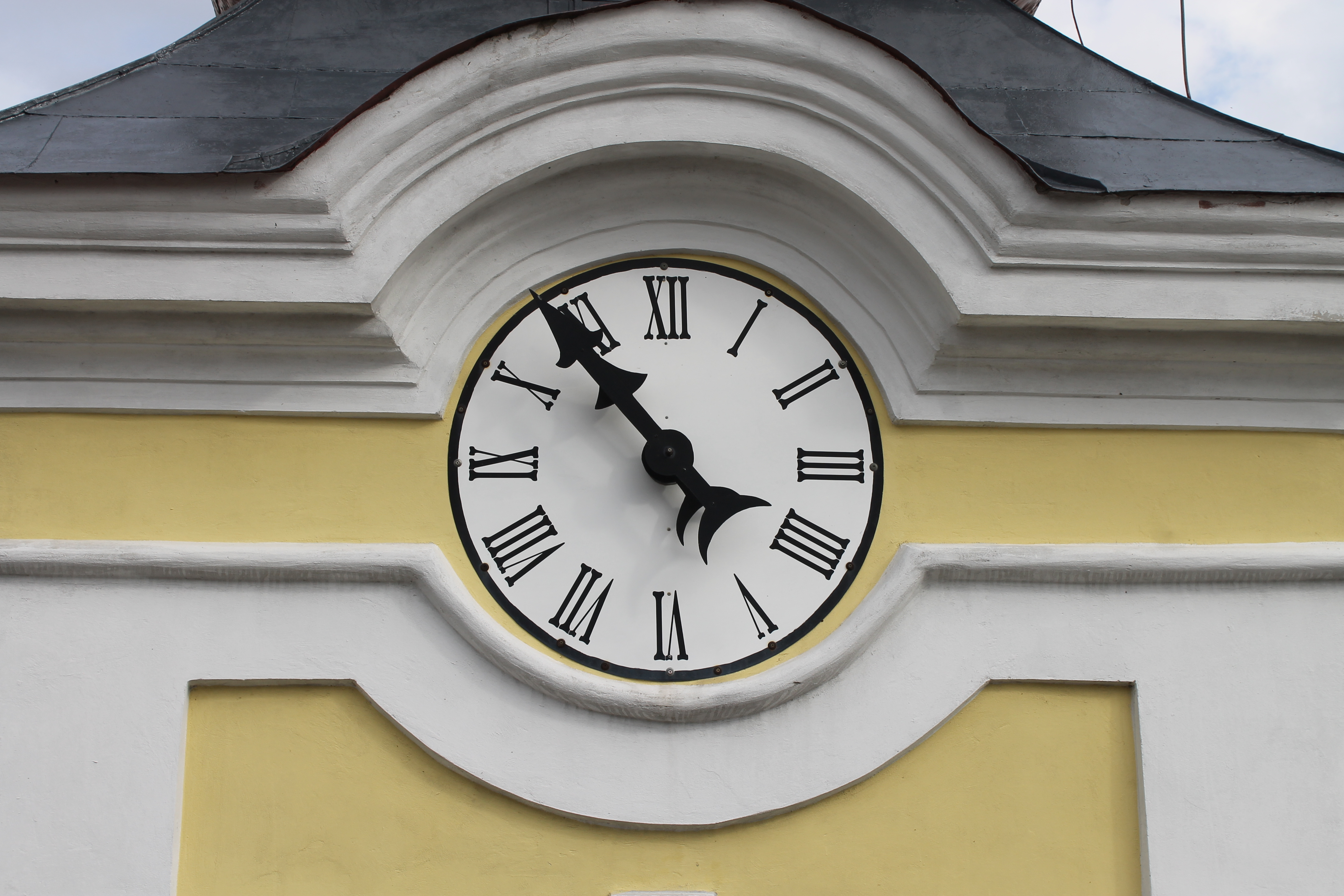 A pilisszentiváni templom toronyórája